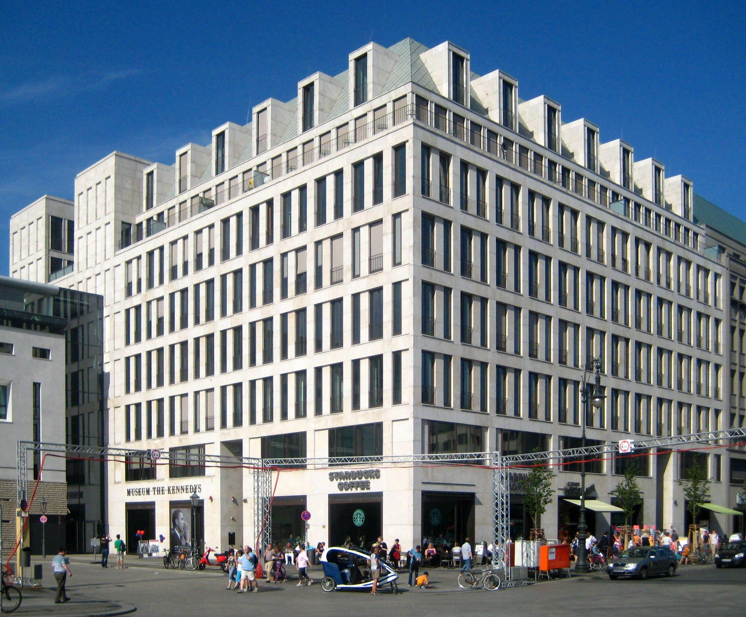 Geschäftshaus und Bürogebäude Unter den Linden 80, Ecke Pariser Platz 4A (links), in Berlin-Mitte. Das an die Französische Botschaft (links) anstoßende Gebäude wurde 1998-2000 nach einem Entwurf des Architektenbüros Ortner & Ortner Baukunst errichtet. Die Geschäftsräume des Hauses werden von dem privaten Museum The Kennedys und einer Starbucks Filiale genutzt. In den Büroräumen sitzen unter anderem die Hauptstadtbüros der Körber-Stiftung und des "Spiegel".